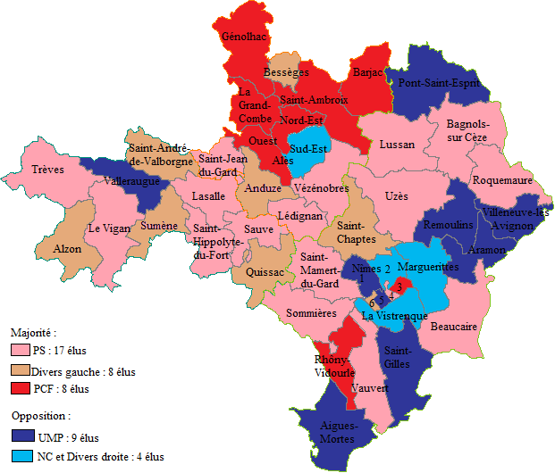 Répartition politique des conseillers généraux du Gard en fonction de leur canton.